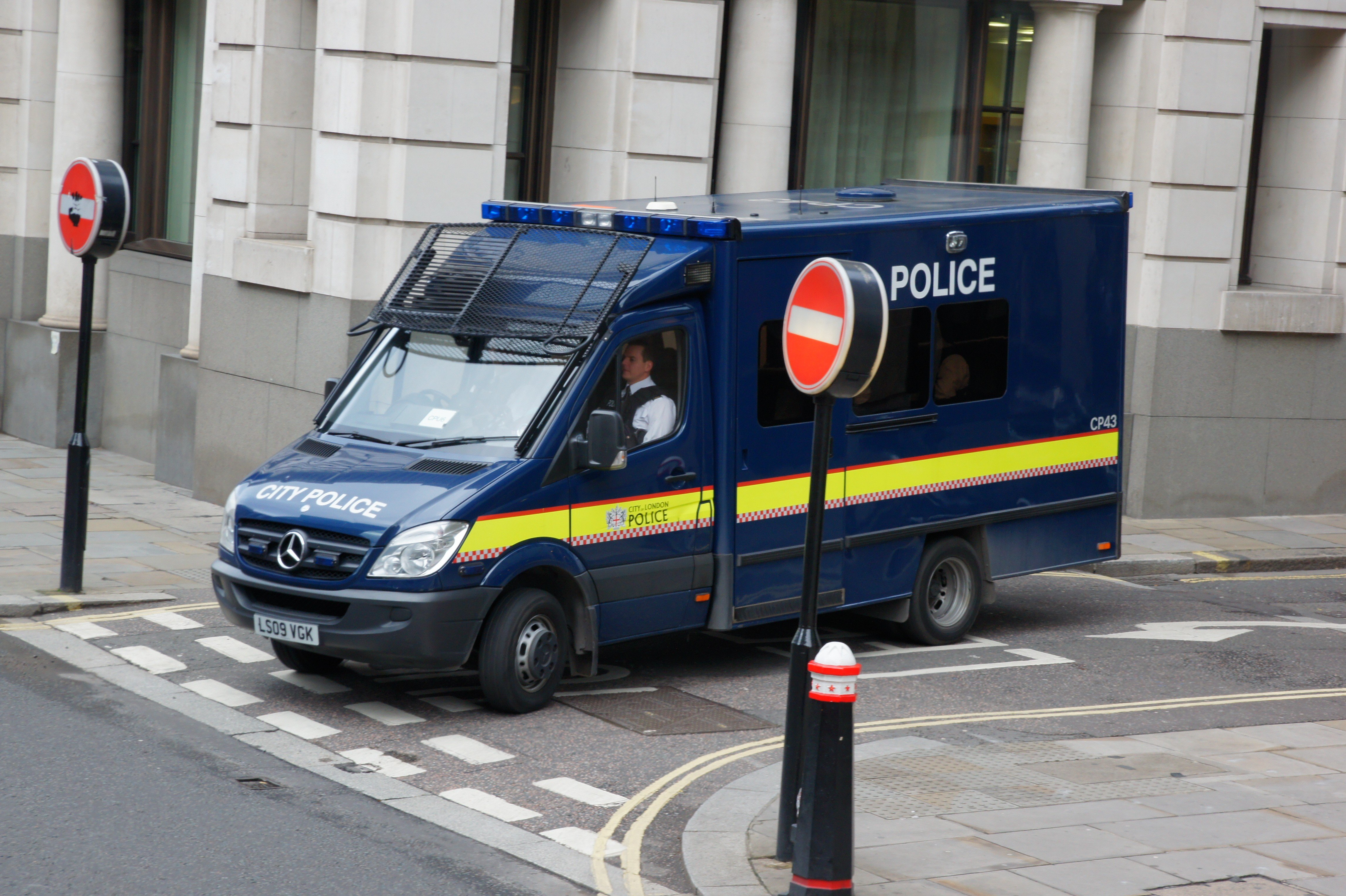 LS09VGK 231013 CPS